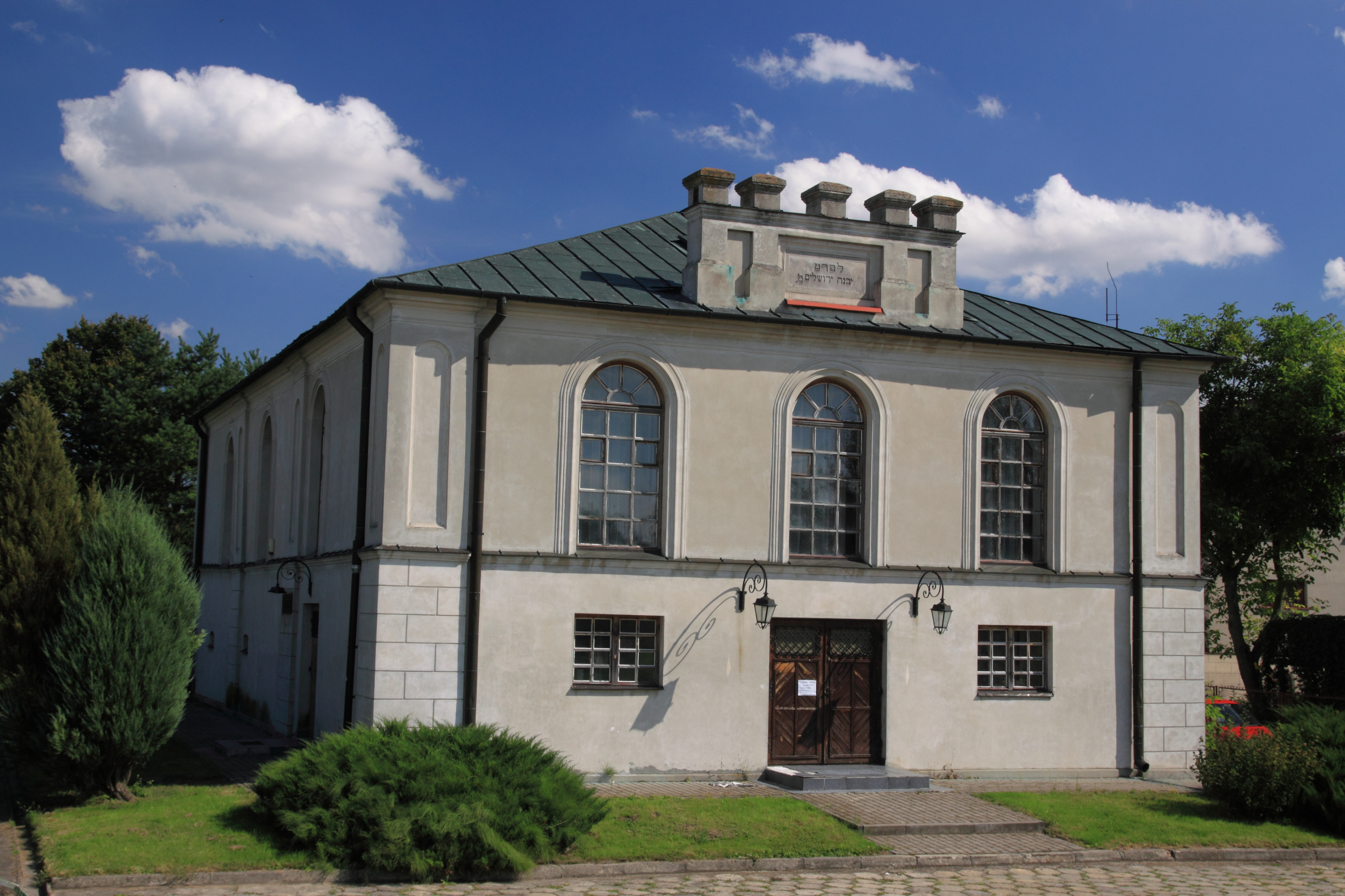 Dawna synagoga w Wojsławicach